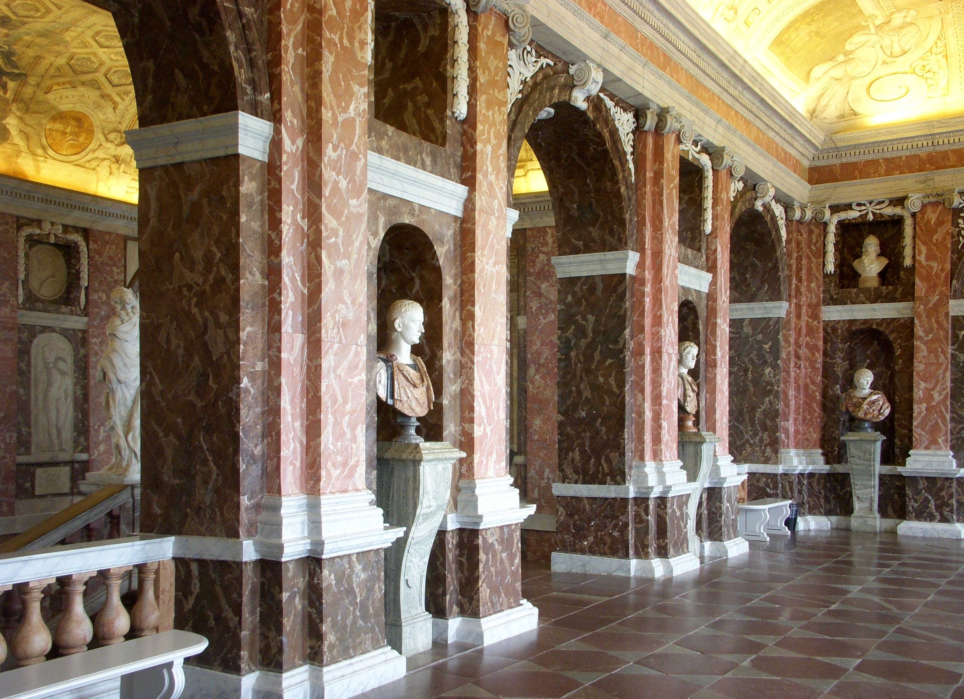 Övre trapphall på Drottningholms slott